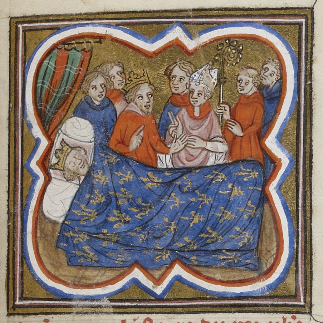 Charles d’Anjou, roi de Sicile, devant le lit d emort de s. Louis